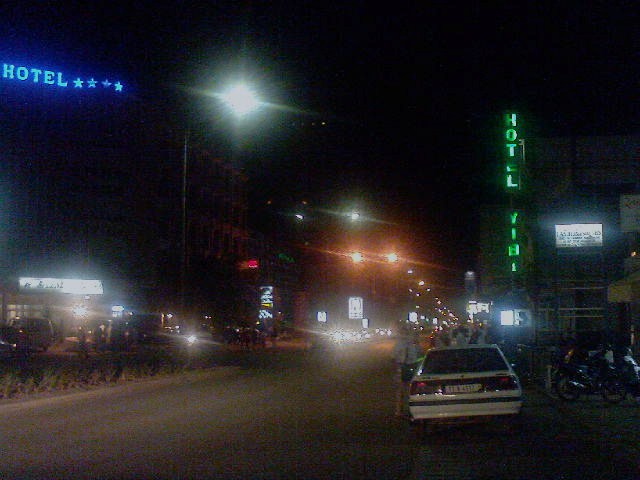 Avenue Kwamé N'Krumah à Ouagadougou (Burkina Faso), la nuit.